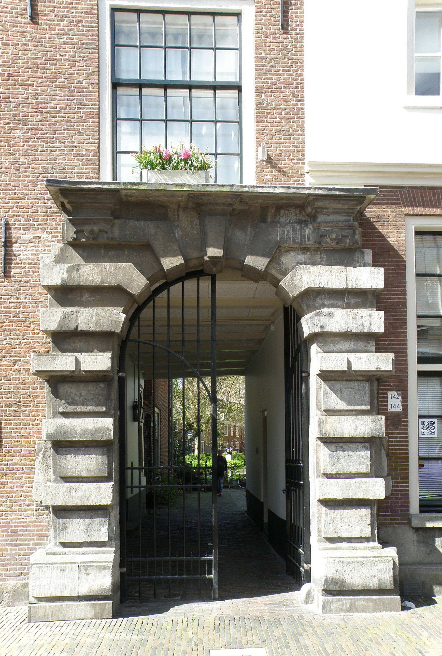 Haarlem, Nederland. Proveniershof, gelegen aan de Grote Houtstraat 140, ingangspoort